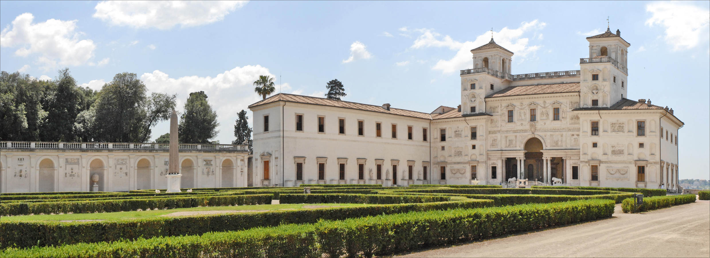 L'Académie de France, créée par Louis XIV en 1666, a été transférée à la ville Médicis en 1804, par Napoléon. La villa a été restructurée en 1564 pour le compte du Cardinal Giovanni Ricci di Montepulciano avant de devenir la propriété des Médicis. Elle dépend aujourd'hui du ministère français de la culture. Des artistes de toutes les disciplines y sont toujours accueillis en résidence et l'établissement organise des expositions et des manifestations culturelles. Le bâtiment est caractéristique des villas romaines du 16ème siècle, avec loggia, façade décorée d'éléments antiques, de statues et jardin à l'italienne avec allées, fontaines, sculptures, "studiolo". On peut visiter la villa et le jardin en groupe avec un guide. La villa Médicis est située sur la colline du Pincio, à proximité de l'église "Trinita dei Monti" et de la place d'Espagne, un des hauts lieux du tourisme à Rome, elle jouit d'une vue extraordinaire sur Rome (voir le panorama)